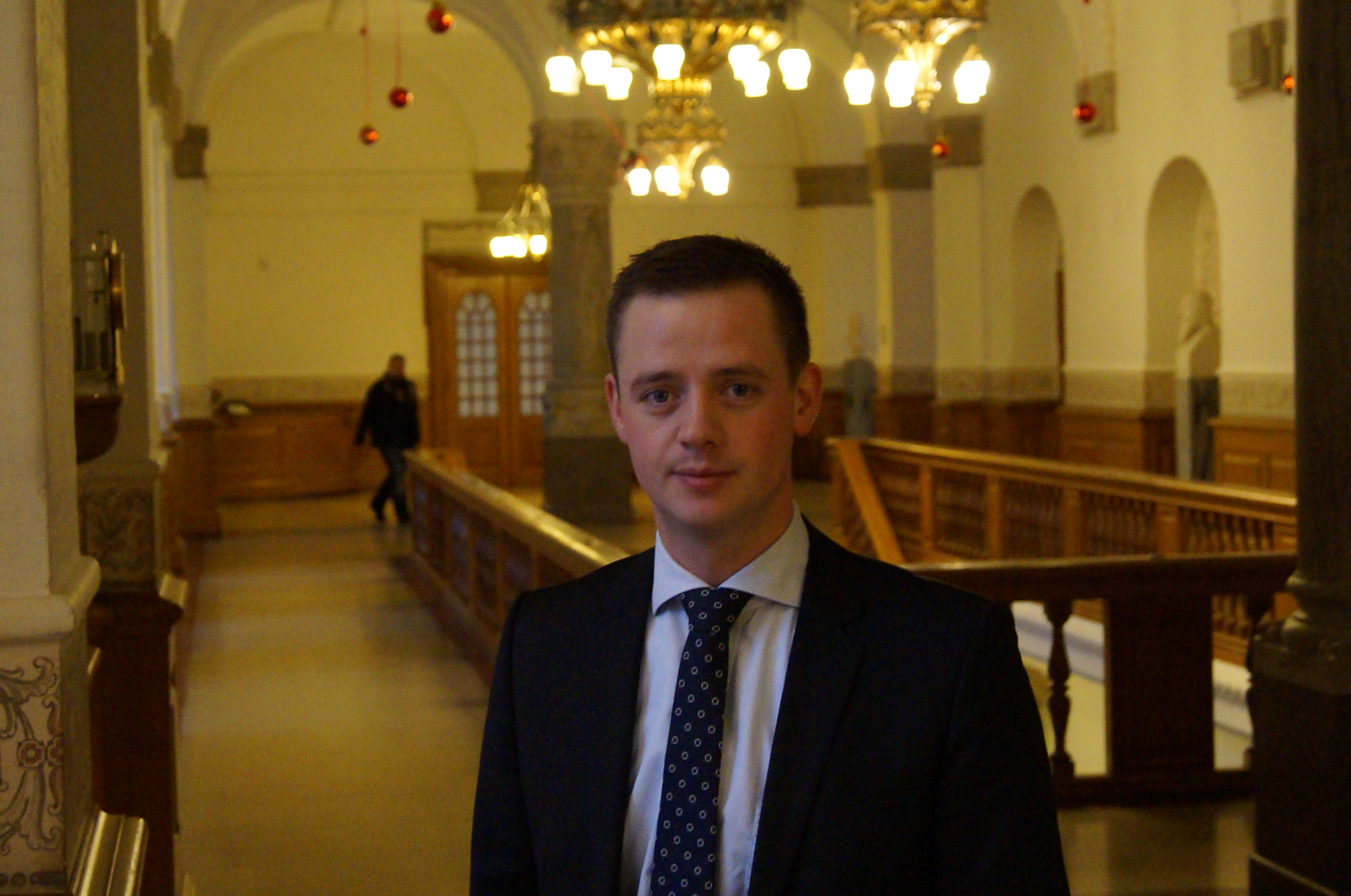 Fotograferet 20/12-2012